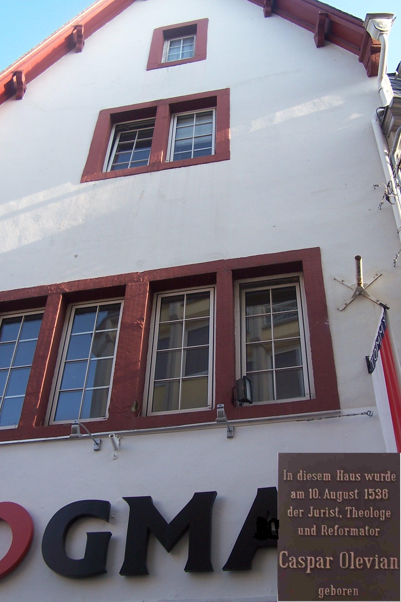 Das gotische Haus „Wittlich", Geburtshaus (10.8.1536) von Caspar Olevian in der Trierer Grabenstraße am Pranger. Eigene Fotomontage anlässlich der Anbringung des Plakates am Caspar-Olevian-Haus in Trier This is a retouched picture, which means that it has been digitally altered from its original version. Modifications: photo composition of the house and the plaque on it..